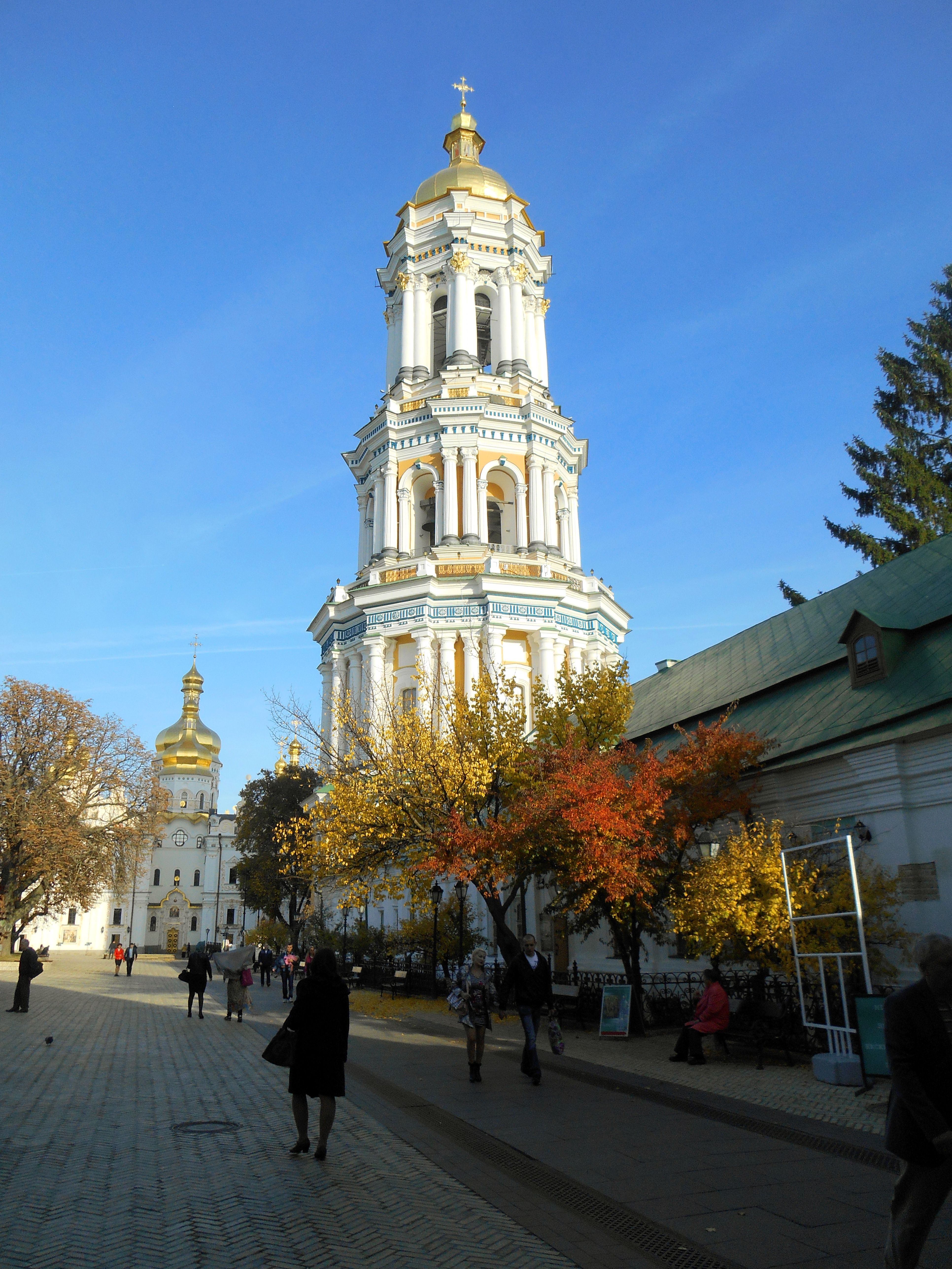 Дзвіниця велика Успенського собору, Київ, Лаврська вул., 9